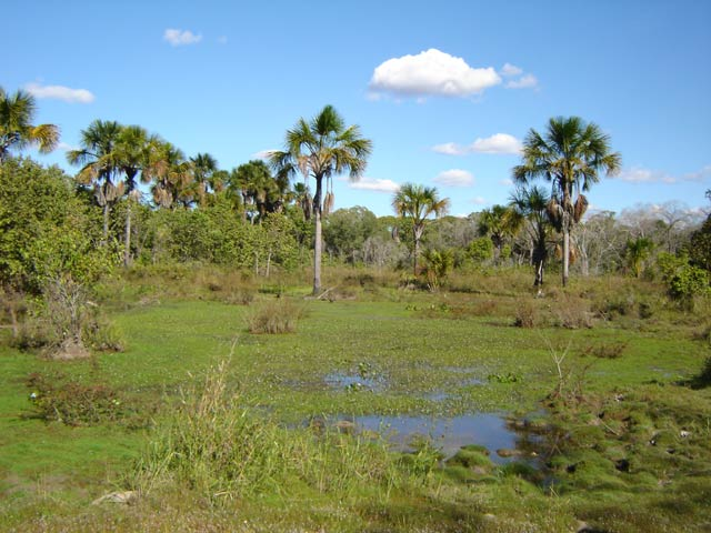 Típica lagoa temporária formada pelo acúmulo de água das chuvas na zona rural do município de Santa Rita de Cássia - BA